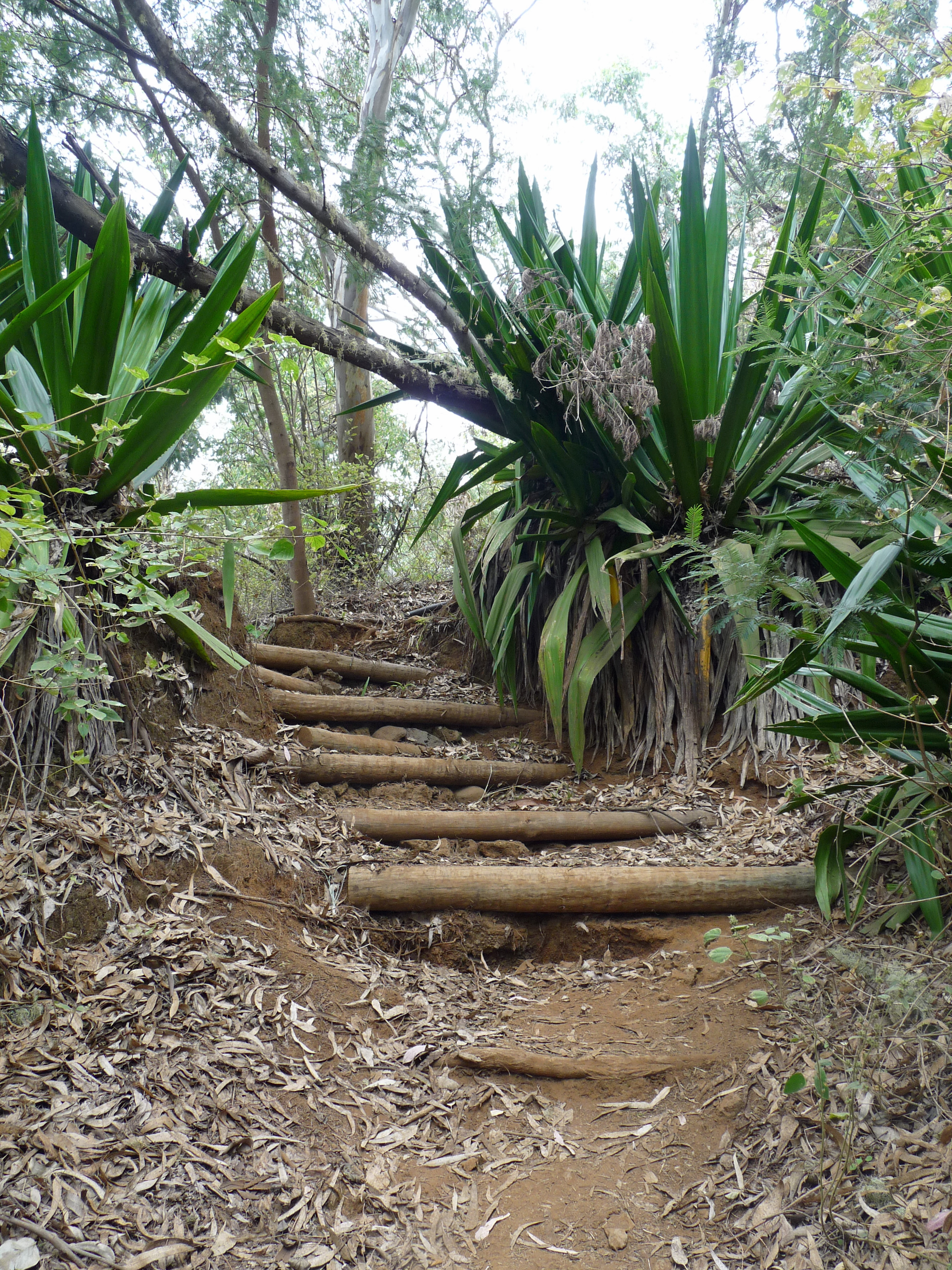 Fogo (Cap-Vert) : Sentier de randonnée entre Monte Velho et Mosteiros, bordé d'agaves (sisal)